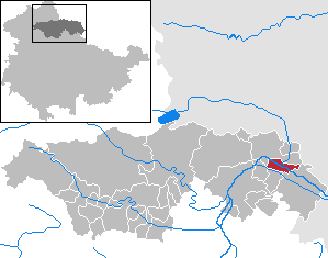 Kalbsrieth in Thuringia - Kyffhäuserkreis